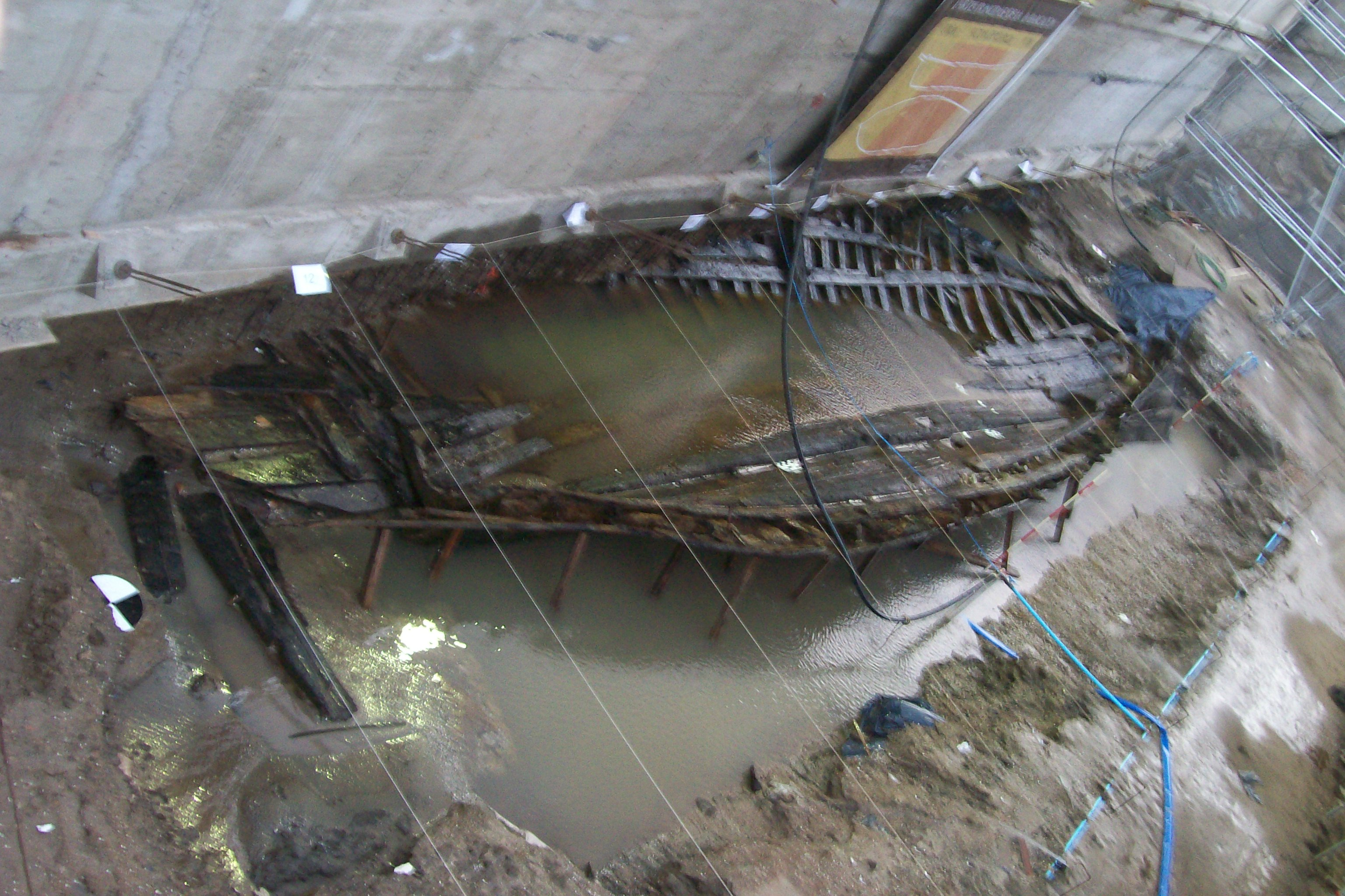 Barco hundido hallado en Puerto Madero